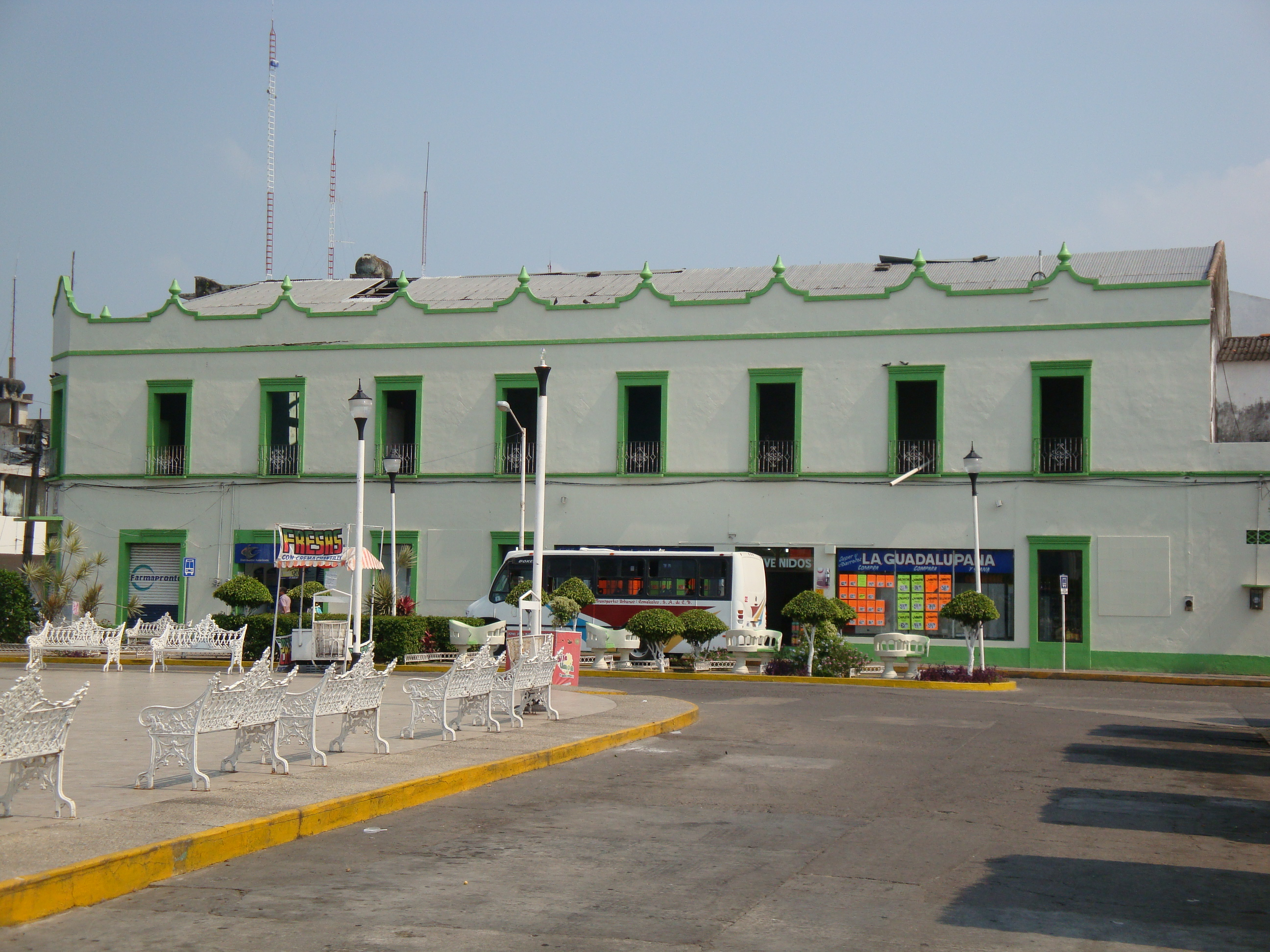 Edificio antíguo frente al parque principal, Comalcalco, Tabasco.